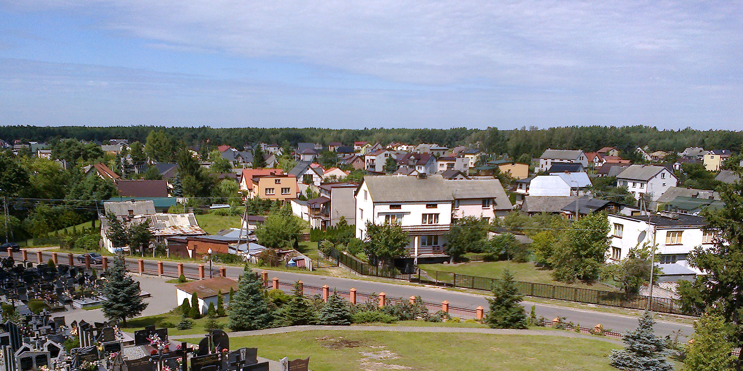 Kadzidło (powiat ostrołęcki)